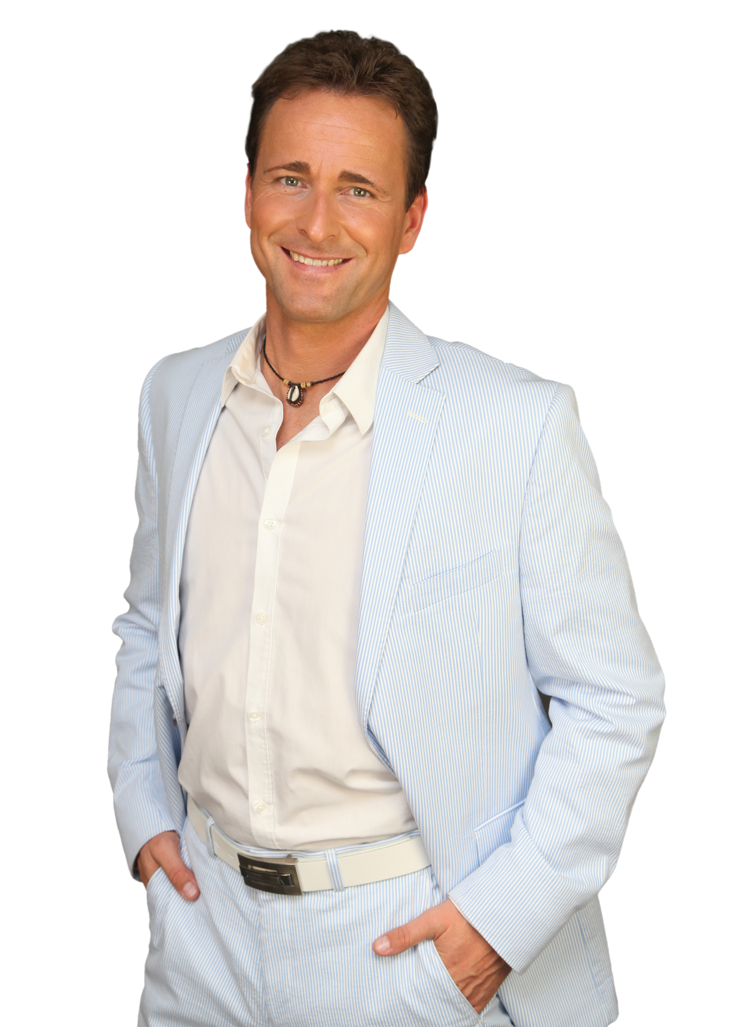 Pressefoto Kay Dörfel